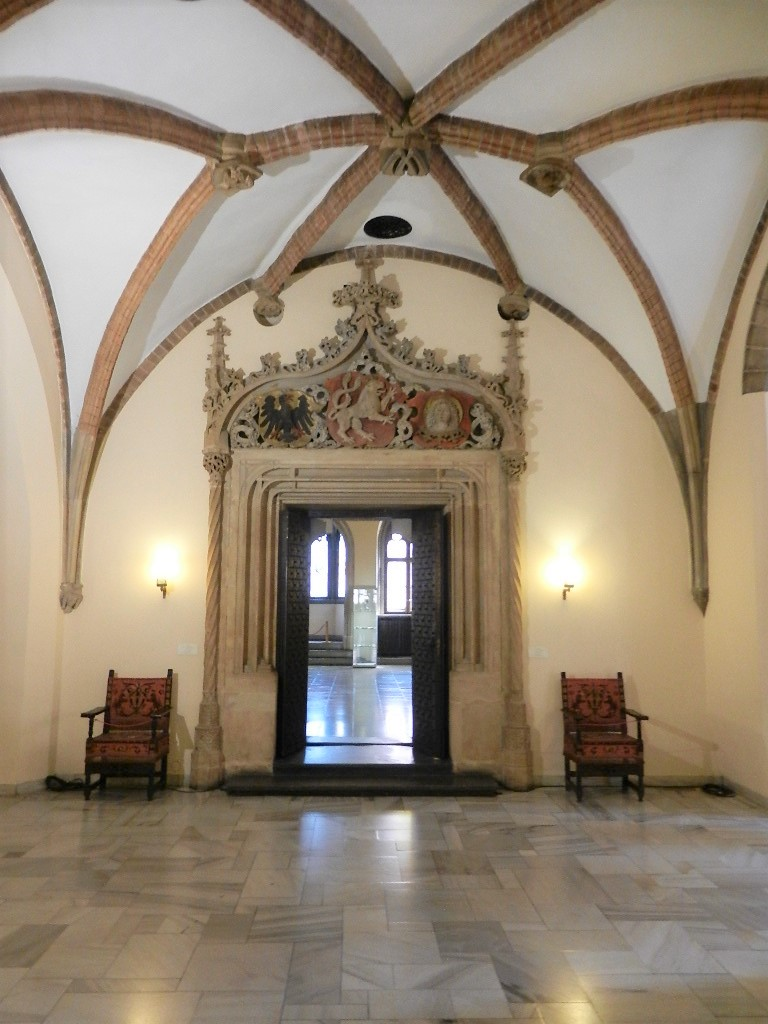 Eingang zum Fürstensaal mit gestäbten gotischen Eingang vom Großen Saal gesehen